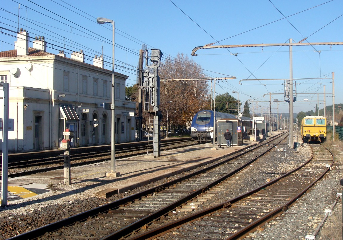 Une rame Intercity-TER Lyon - Marseille à l'arrêt en gare de Rognac (Bouches-du-Rhône). Sur la droite, la voie unique vers Aix-en-Provence et une voie de remise.